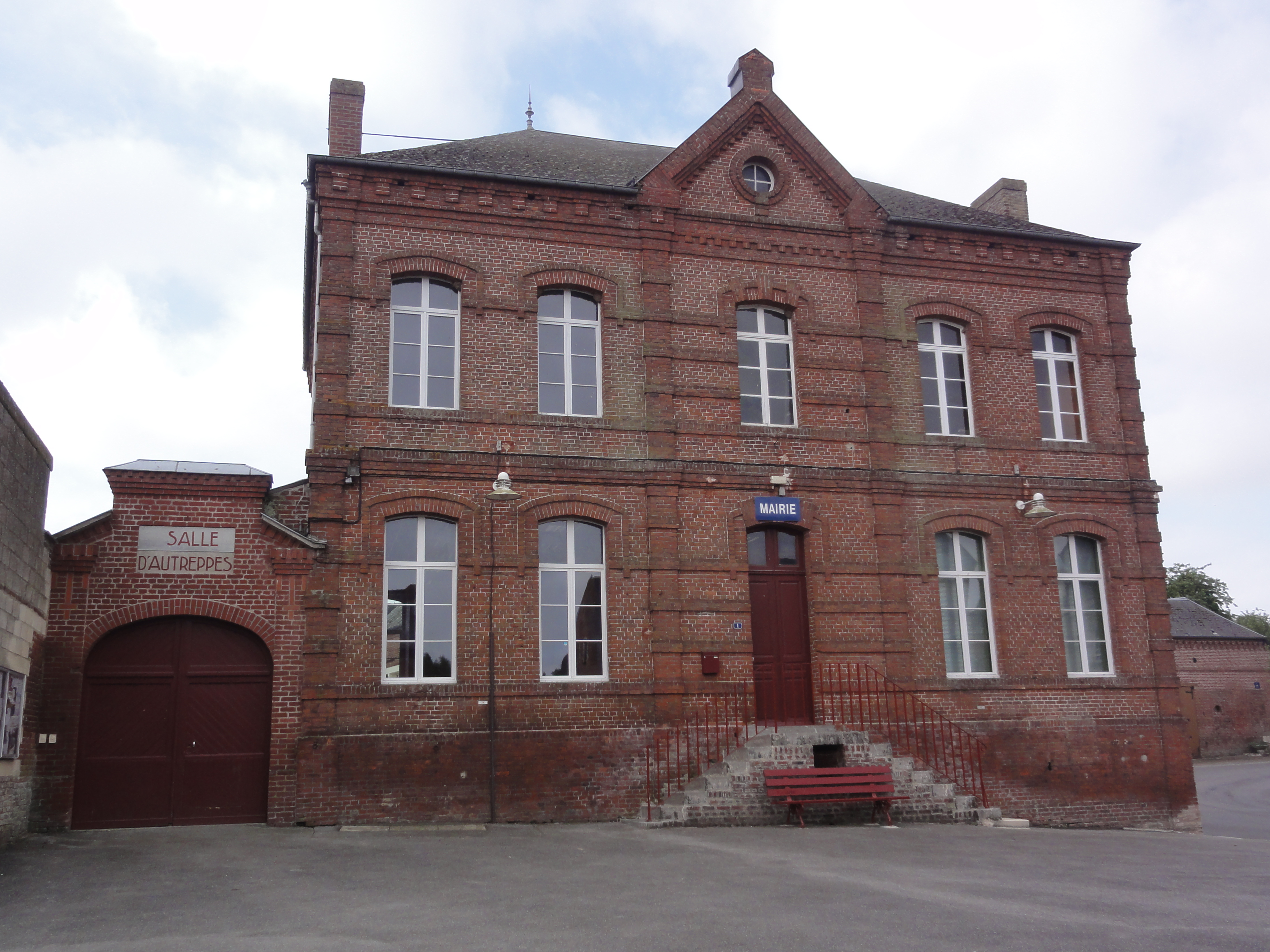 Autreppes (Aisne) mairie